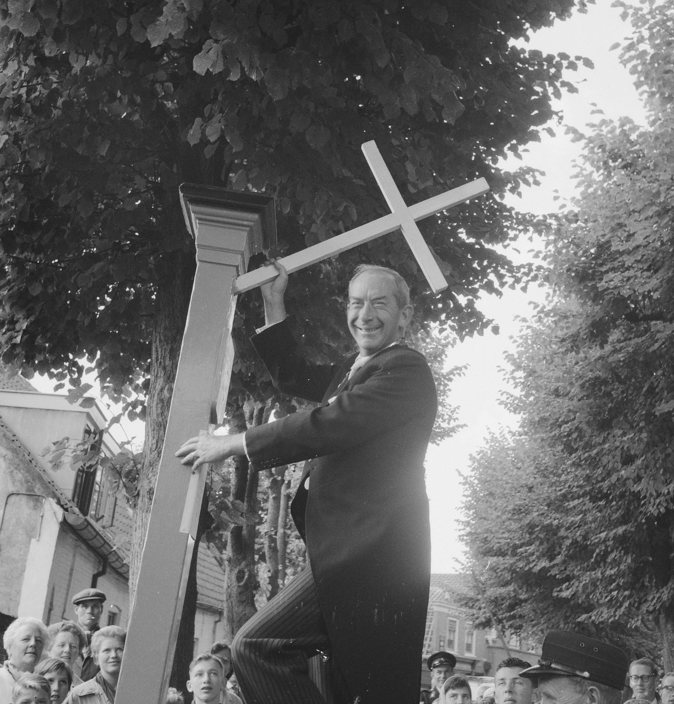 Collectie / Archief : Fotocollectie Anefo Reportage / Serie : [ onbekend ] Beschrijving : Paardenmarkt in Voorschoten. Burgemeester L. de Kool van Voorschoten plaatst bij de aanvang van de paardenmarkt het marktkruis om aan te geven dat de markt een vrijplaats is, tussen dit kruis en het kruis aan de andere zijde (tussen de beide kruisen kan niemand vervolgd worden). Datum : 28 juli 1961 Locatie : Voorschoten, Zuid-Holland Trefwoorden : burgemeesters, kruisen, markten, paarden Persoonsnaam : Kool, L de Fotograaf : Koch, Eric / Anefo Auteursrechthebbende : Nationaal Archief Materiaalsoort : Negatief (zwart/wit) Nummer archiefinventaris : bekijk toegang 2.24.01.03 Bestanddeelnummer : 912-7789